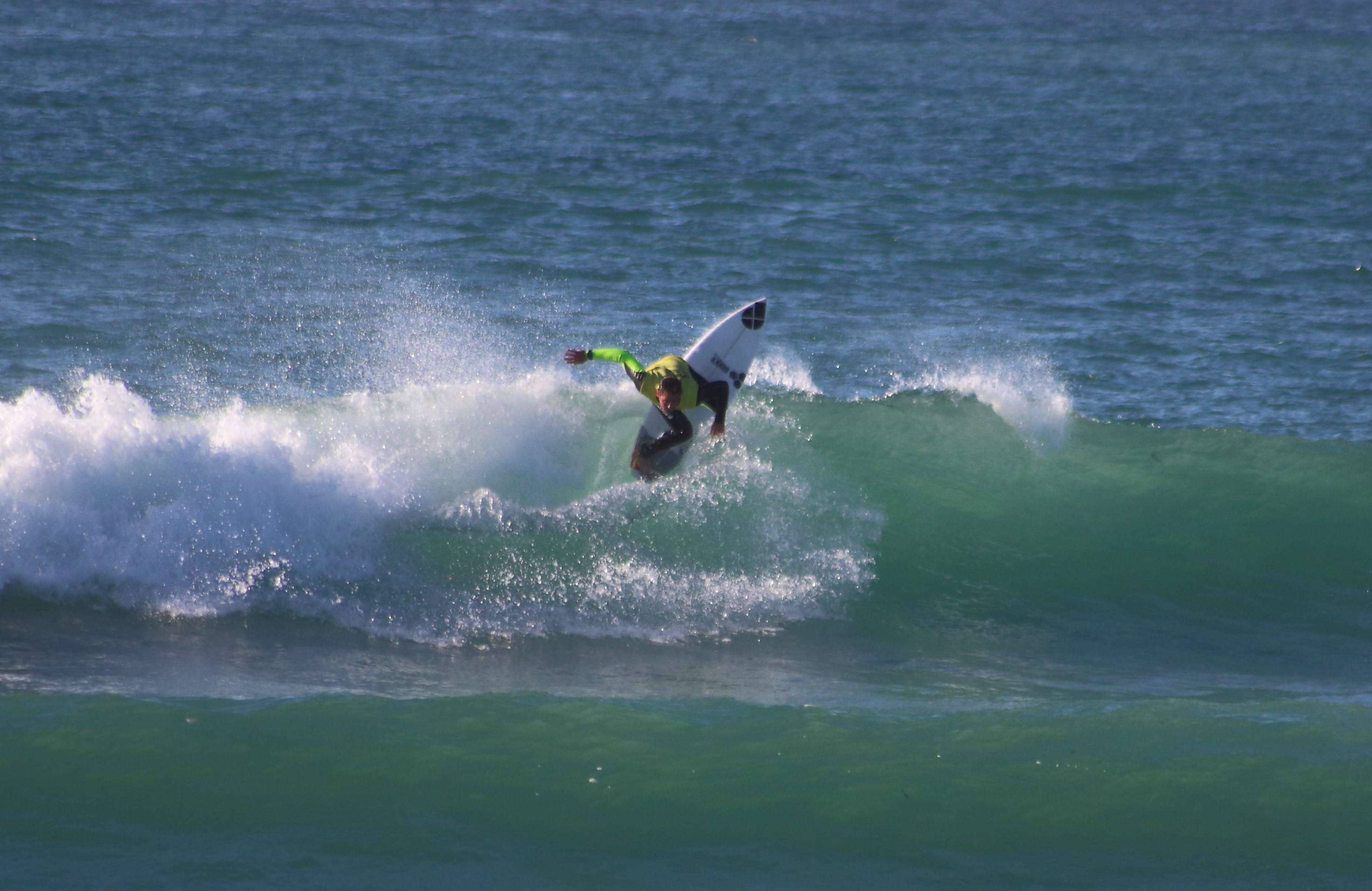 Figure de surf lors des Wave Games 2018 à la pointe de La Torche. Gaspard Larsonneur.